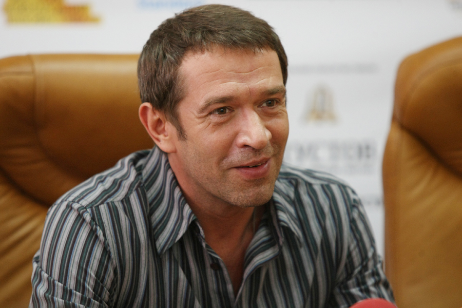 Владимир Машков, советский и российский актёр. Пресс-конференция Владимира Машкова и Алексея Учителя, Одесский международный кинофестиваль 2010. Depicted person: Владимир Машков